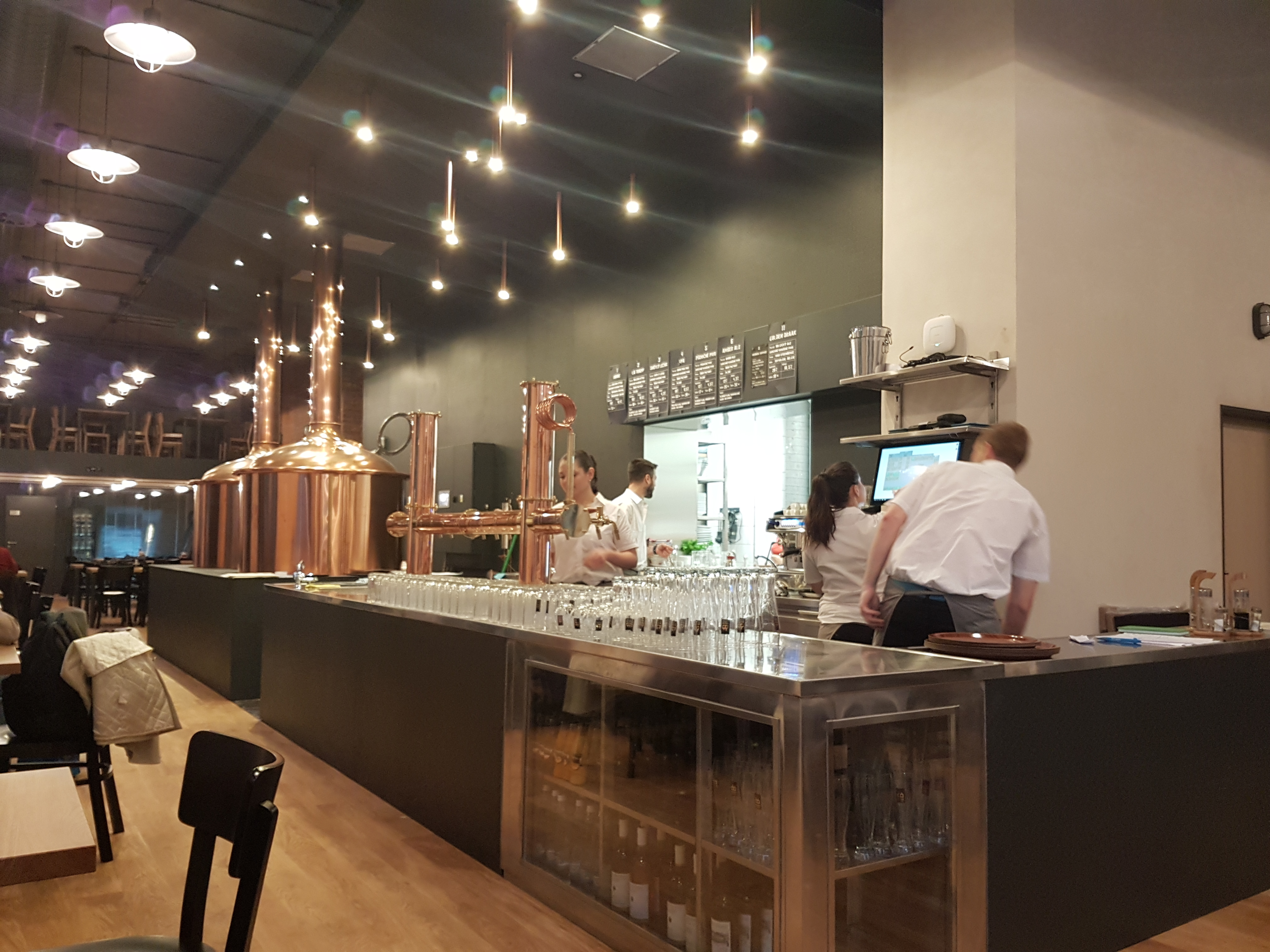 Pivovar s restaurací.